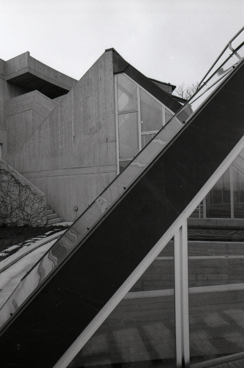 Servizio fotografico : Urbino, 1982 / Paolo Monti. - Strisce: 7, Fotogrammi complessivi: 34 : Negativo b/n, gelatina bromuro d'argento/ pellicola ; 35 mm. - ((Sul portanegativi: N[I]K[MA]T-EL FP4 e iscrizione: "Arch De Carlo - Urbino - Università di Magistero 4-37". - Fonte: Agenda di Paolo Monti: Nikon Leika 3001-/ Monti 1978 (1978-1982), presso Archivio Paolo Monti